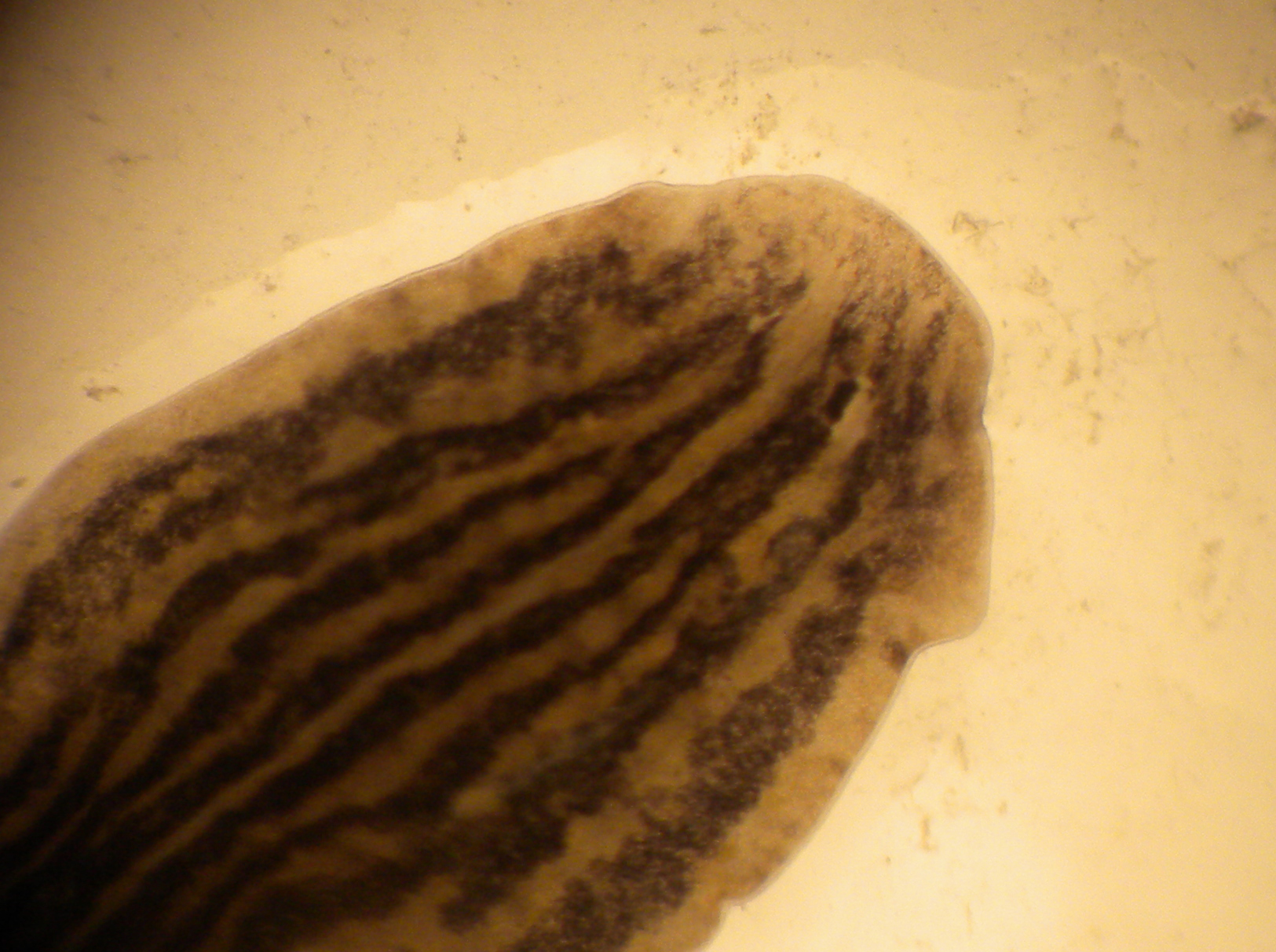 planaria regenerando